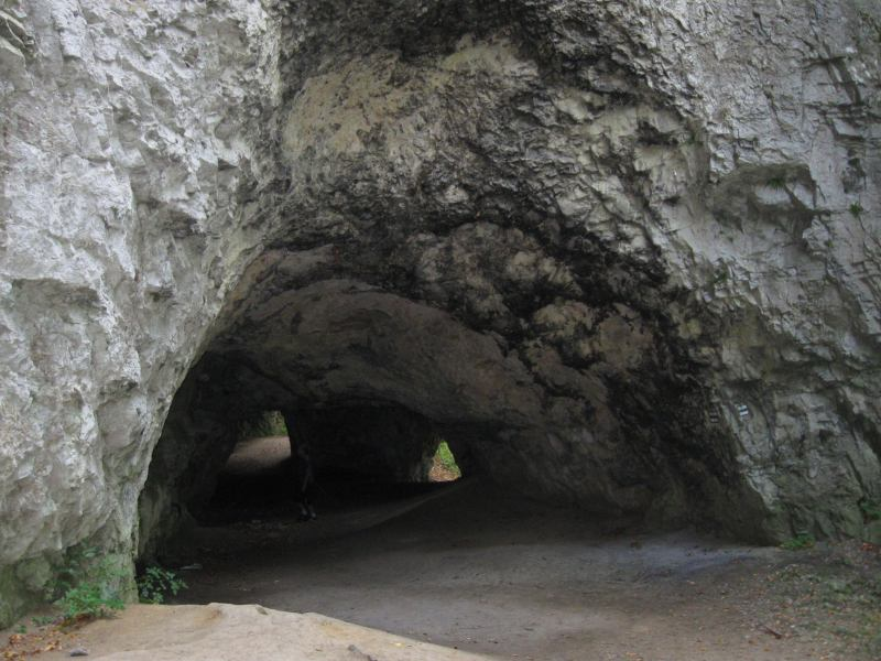 Křtinské údolí - jeskyně Jáchymka